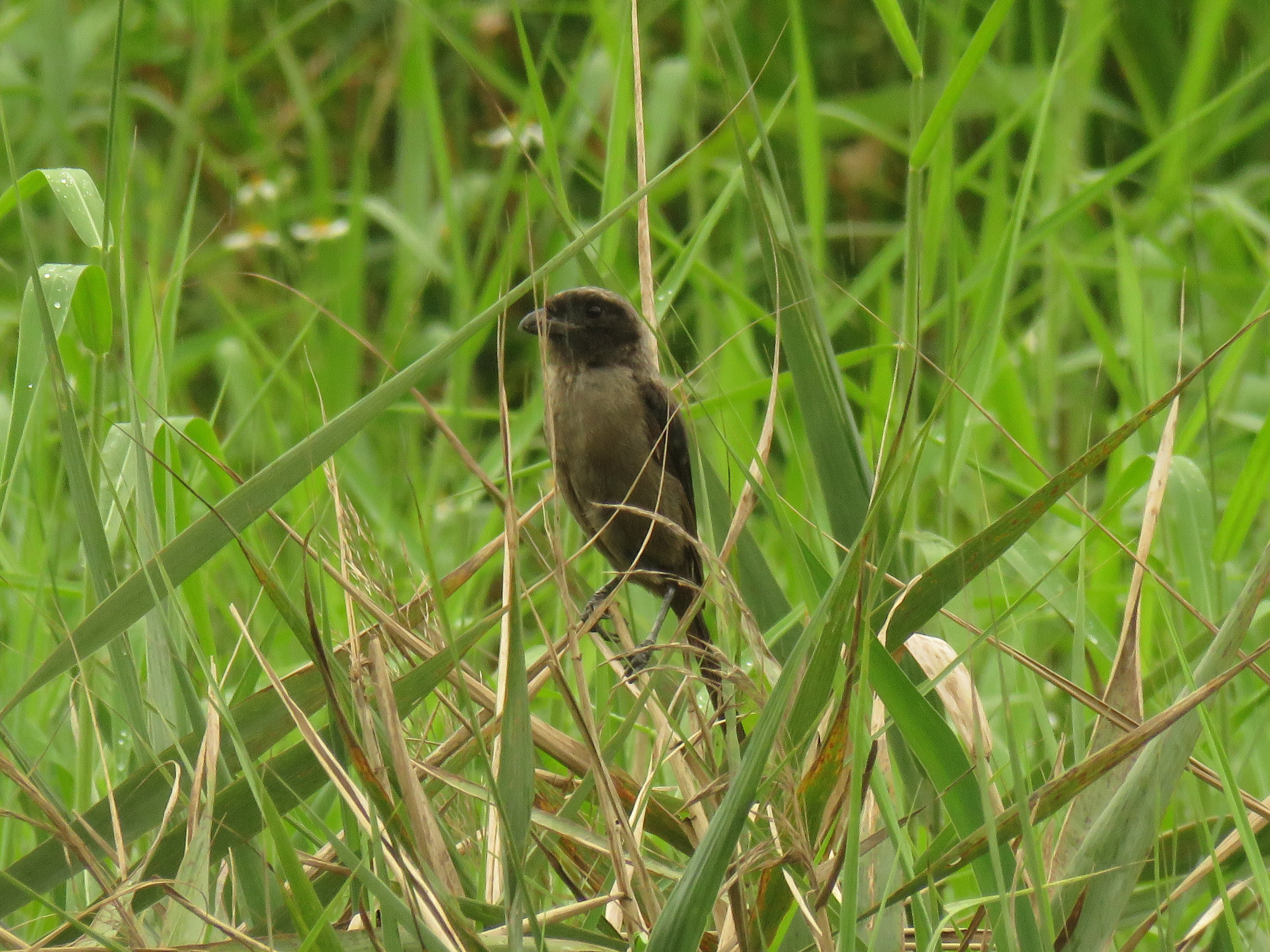 Lanius schach Linnaeus, 1758, Long-tailed Shrike, dark morph, Hong Kong Wetland Park, Hong Kong, 1 September 2018